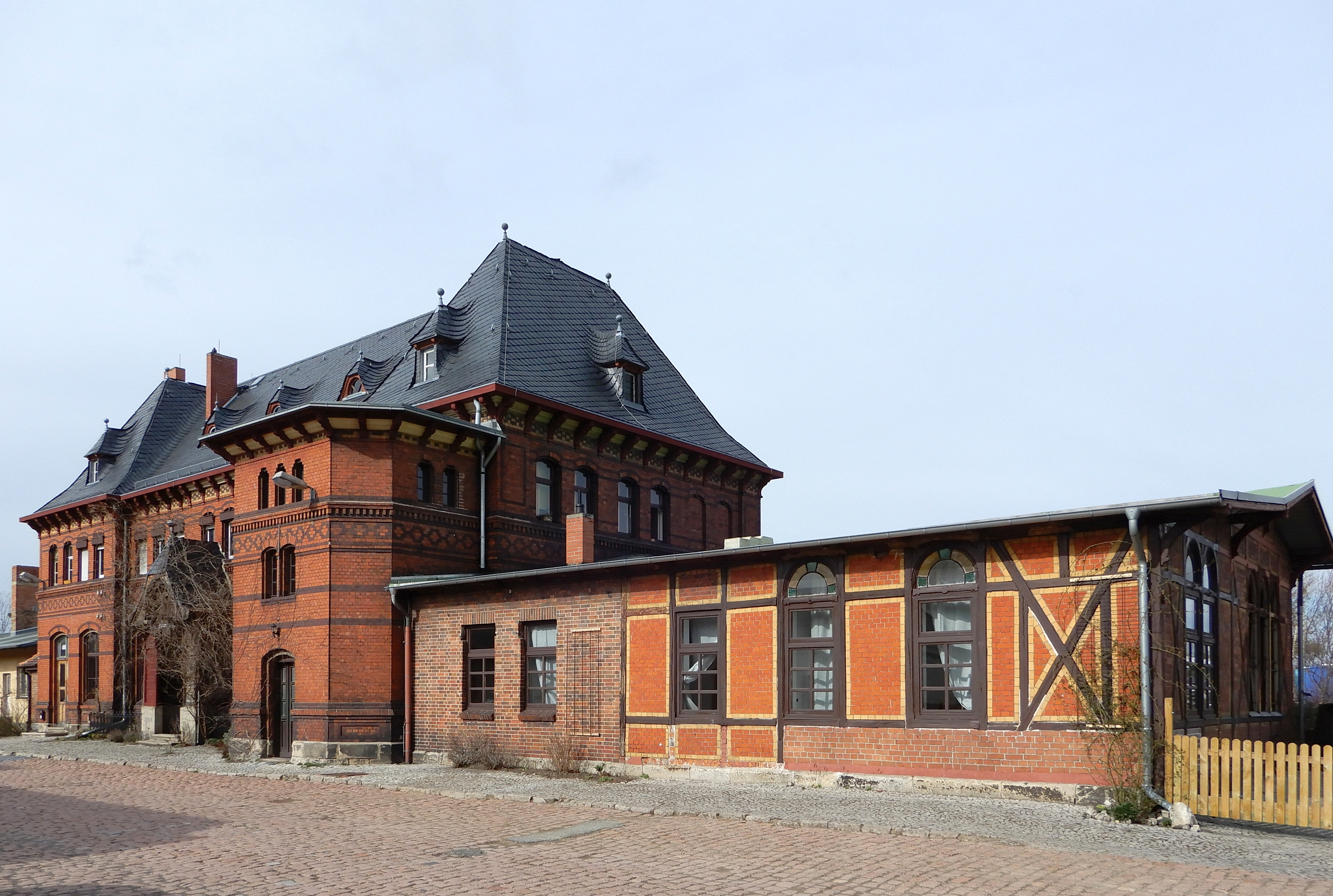 Bahnhof Gernrode der stillgelegten Strecke Frose-Quedlinburg